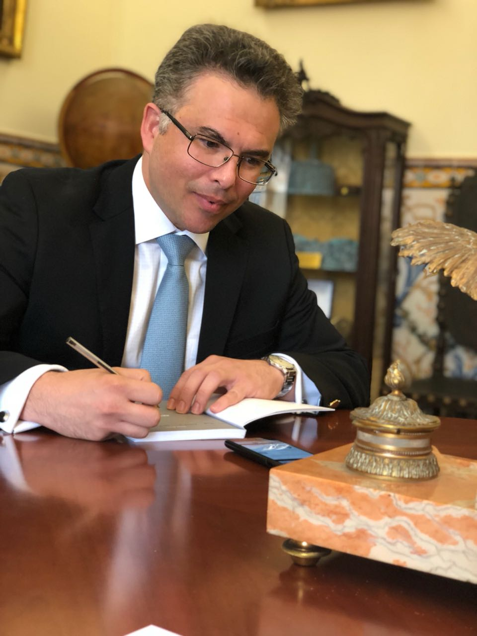 Daniel Blume em 2018